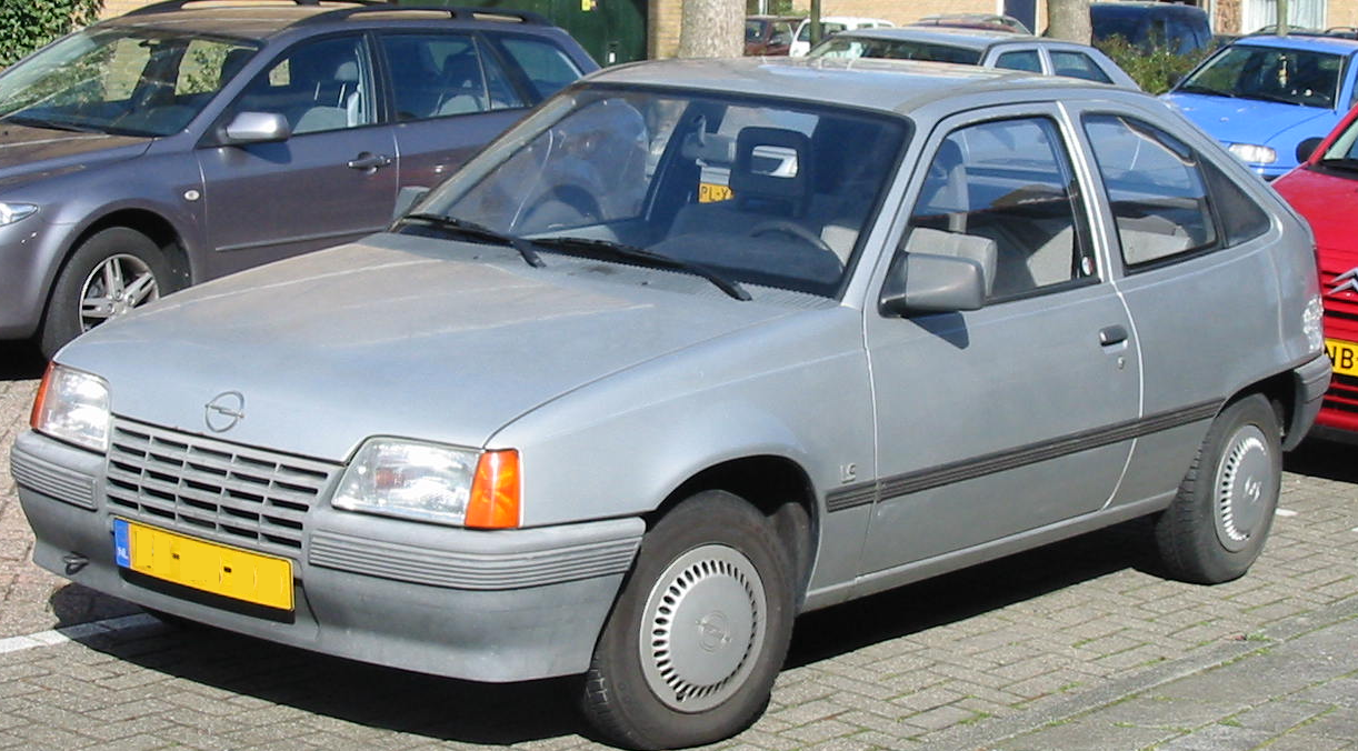 Opel Kadett 1987 1.3N Hatchback